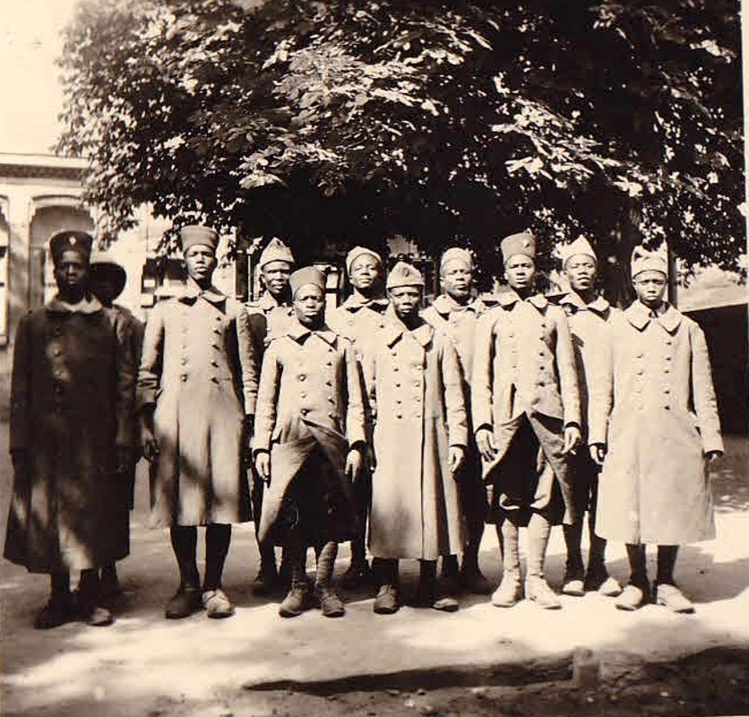 Französische Kriegsgefangene afrikanischer Herkunft im Jahr 1940